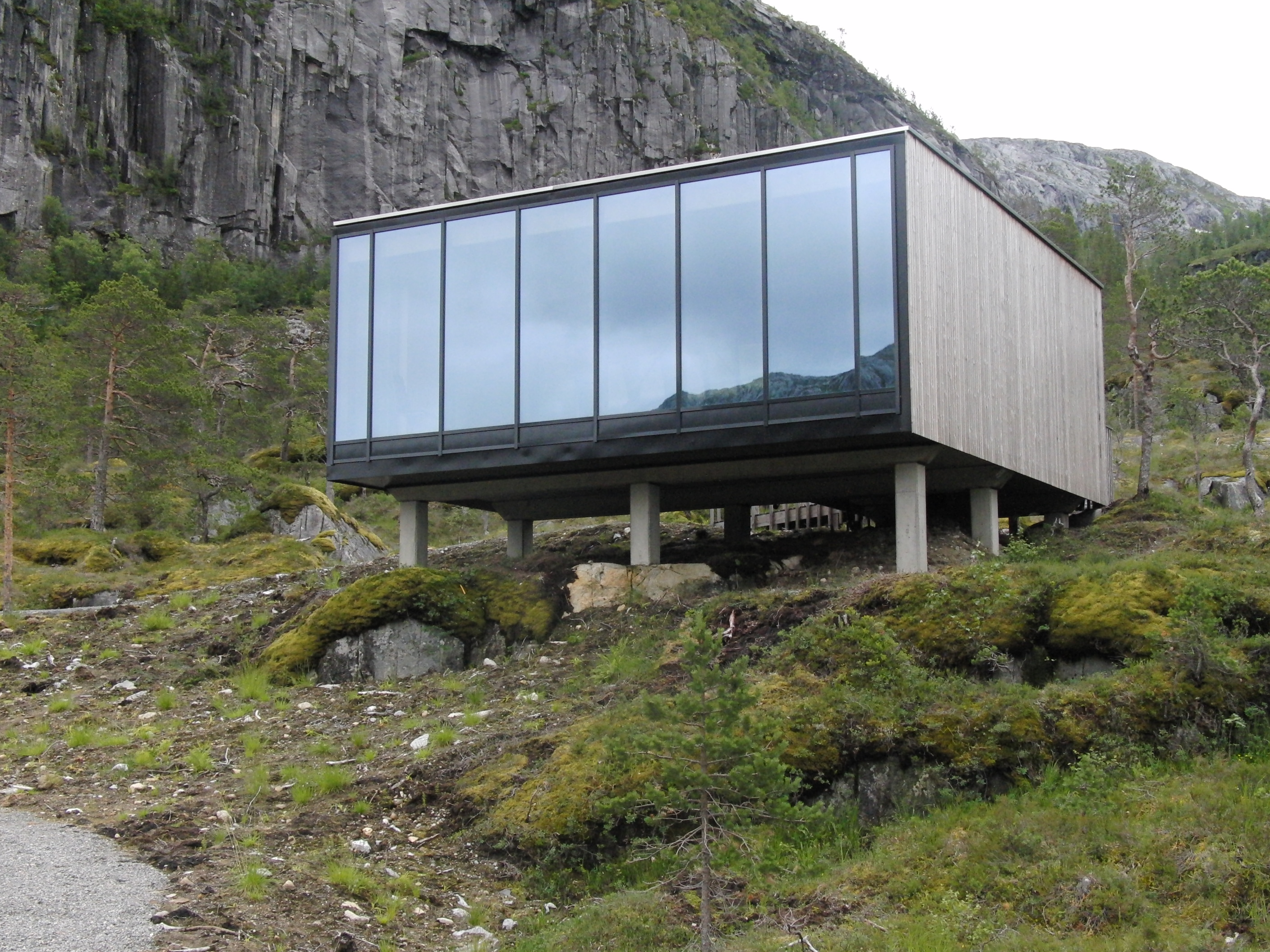 Øvre Forsland kraftverk, besøkssenter